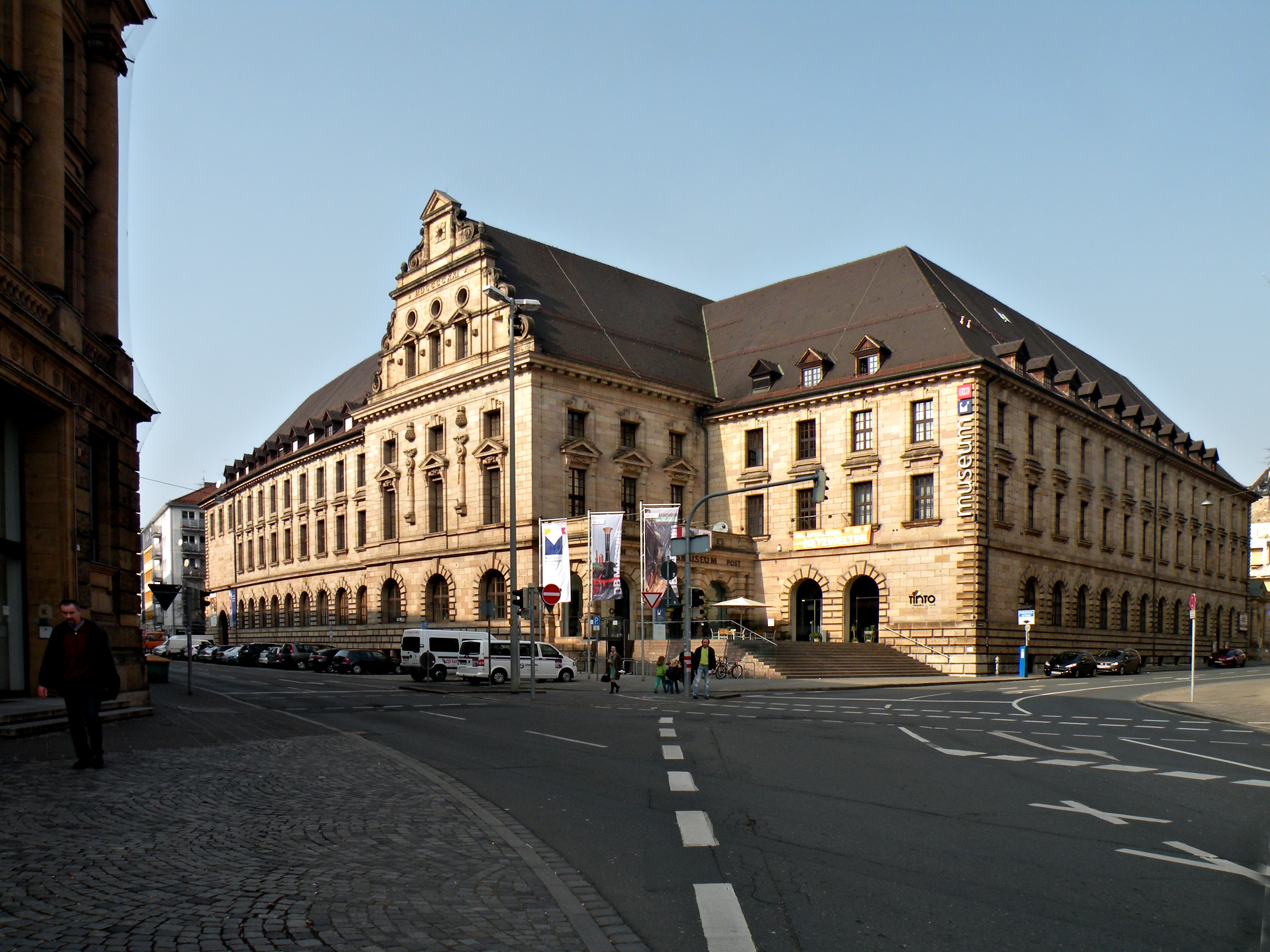 Германский железнодорожный музей